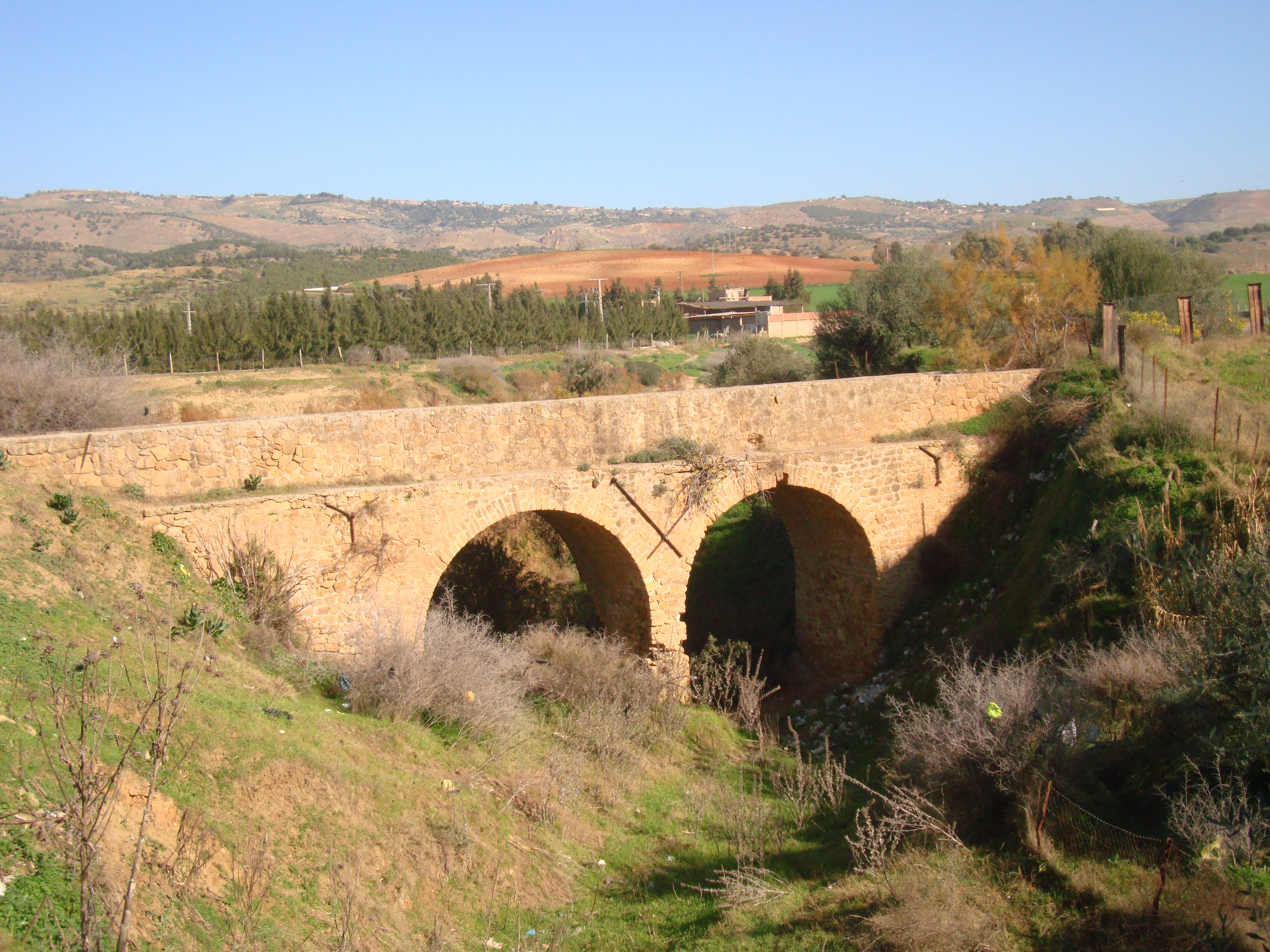 Vestige d'un ancien pont en ruine.